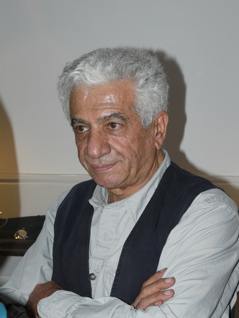 Parviz Tanavoli Iranian Statue maker.